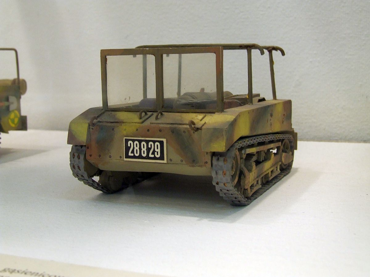 C2P, Muzeum Techniki, Warszawa